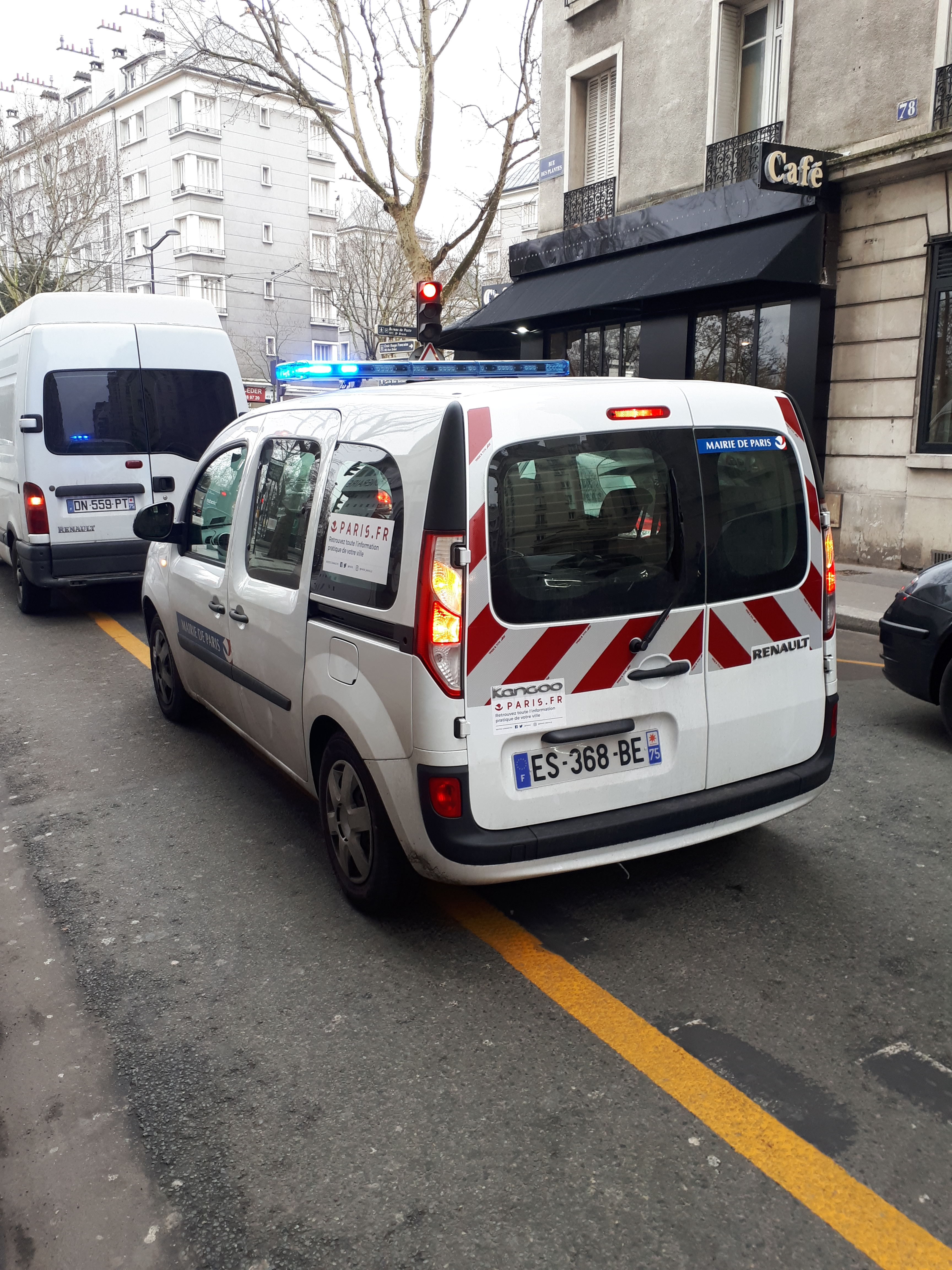 Véhicule de la Direction de la Prévention, de la Sécurité et de la Protection de la Ville de Paris sur un contrôle routier.